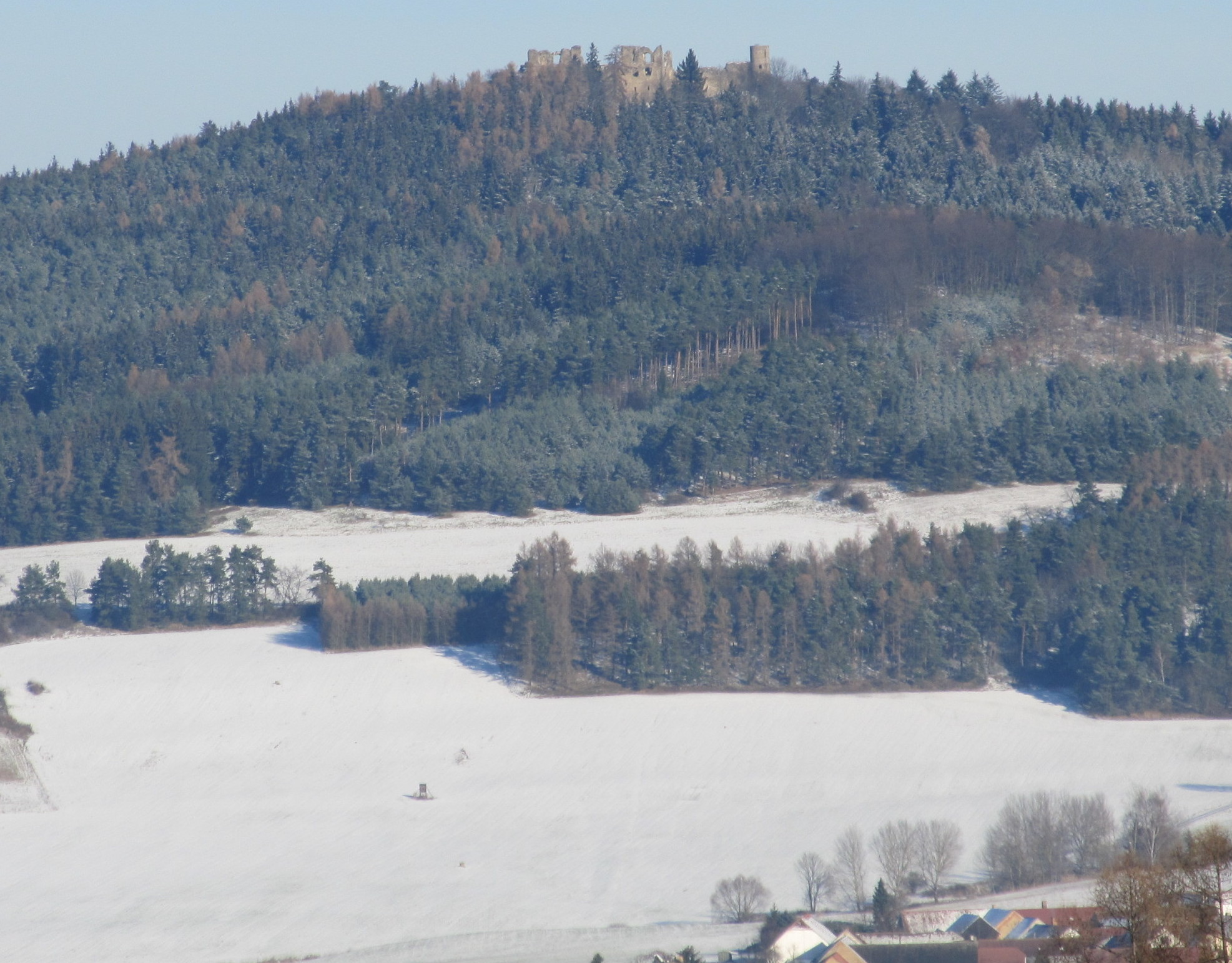 Lipovice - pohled na Helfenburk